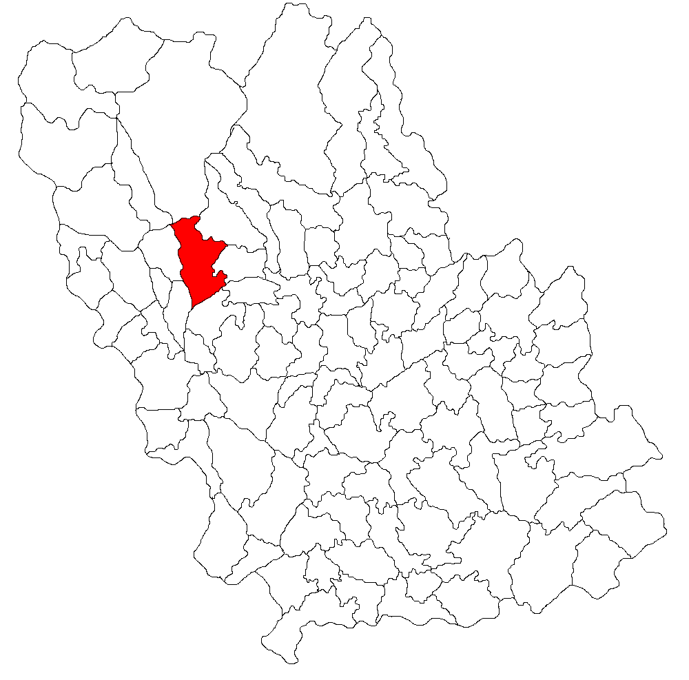 Categorie:Hărţi ale judeţului Prahova